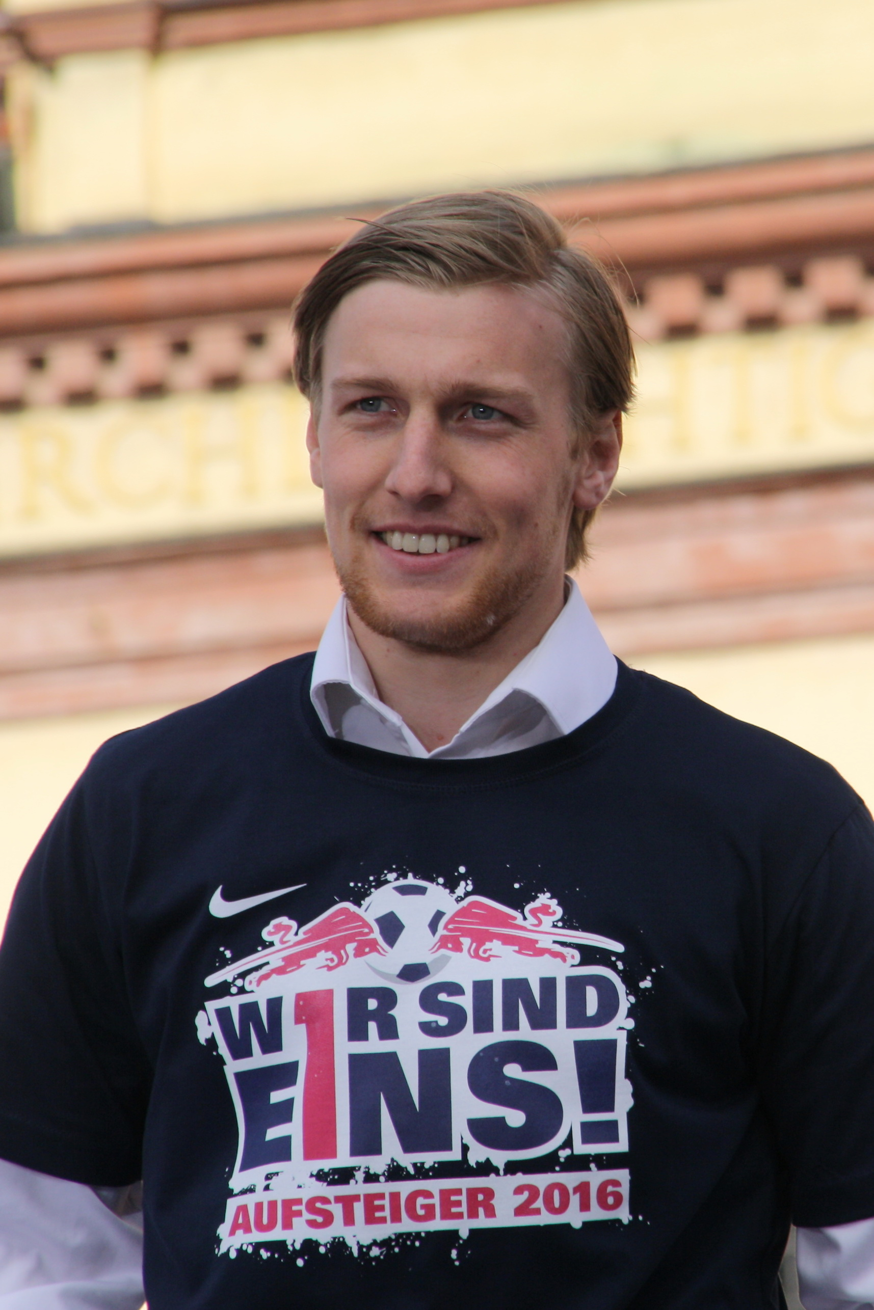 Emil Forsberg bei der Aufstiegsfeier RB Leipzig 2016